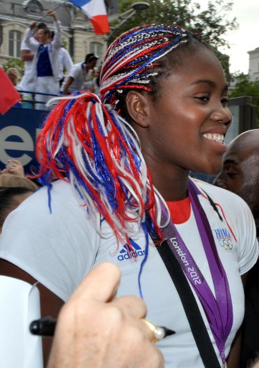 Isabelle Yacoubou au défilé des médaillés français des JO 2012